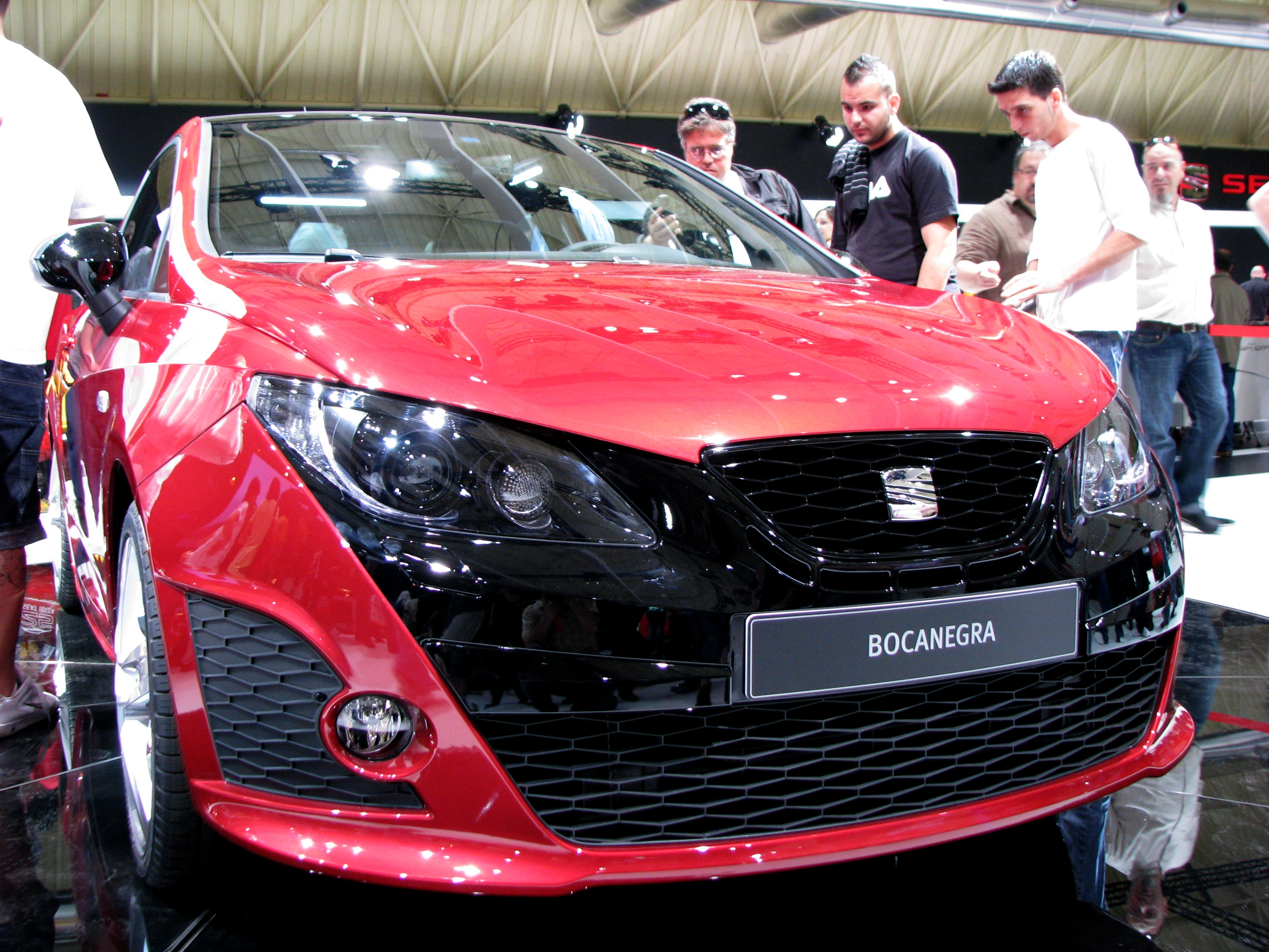 Seat Ibiza Bocanegra en el Salón Internacional del Automóvil de Barcelona 2009